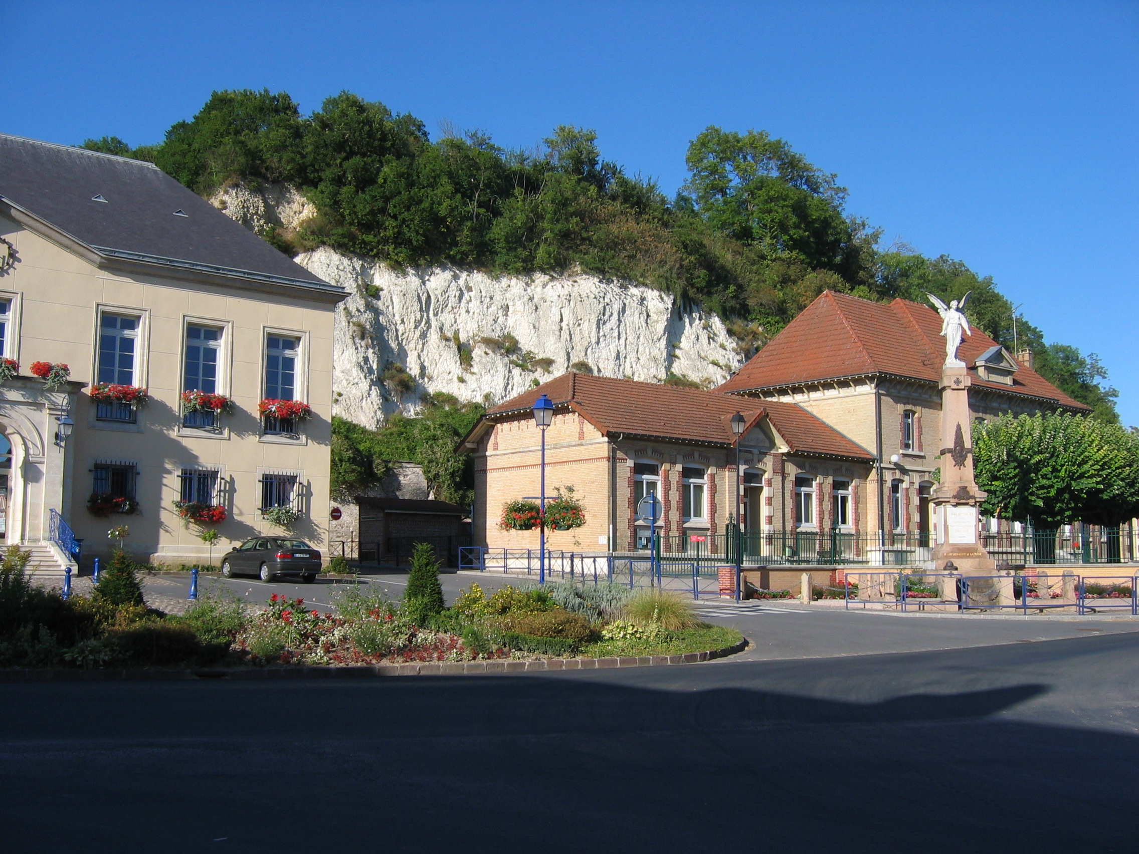 Château-Porcien Ardennes France